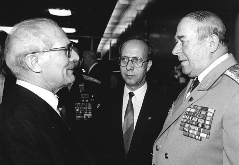 ADN-ZB Mittelstädt 23.10.87 Berlin: Jubiläum-Staatsakt. Mit einem Staatsakt der Deutschen Demokratischen Republik im Palast der Republik fanden die Feierlichkeiten zum 750jährigen Jubiläum Berlins ihren Höhepunkt. Begegnung des Generalsekretärs des ZK der SED und Vorsitzenden des Staatsrates der DDR, Erich Honecker, mit dem Oberkommandierenden der Gruppe der Sowjetischen Streitkräfte in Deutschland, Armeegeneral Waleri Belikow (r.), vor Beginn der festlichen Veranstaltung.